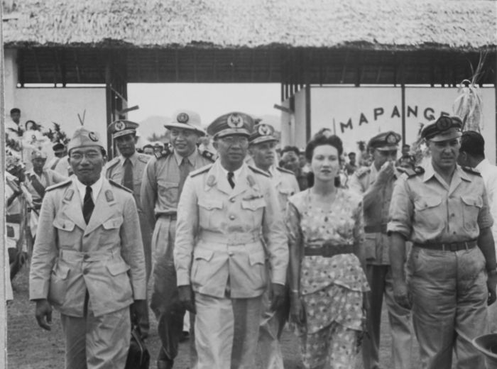 Kunjungan presiden Negara Indonesia Timur Tjokorda Gde Raka Soekawati bersama istrinya yang berkebangsaan Perancis di Minahasa, Sulawesi Utara pada tahun 1948